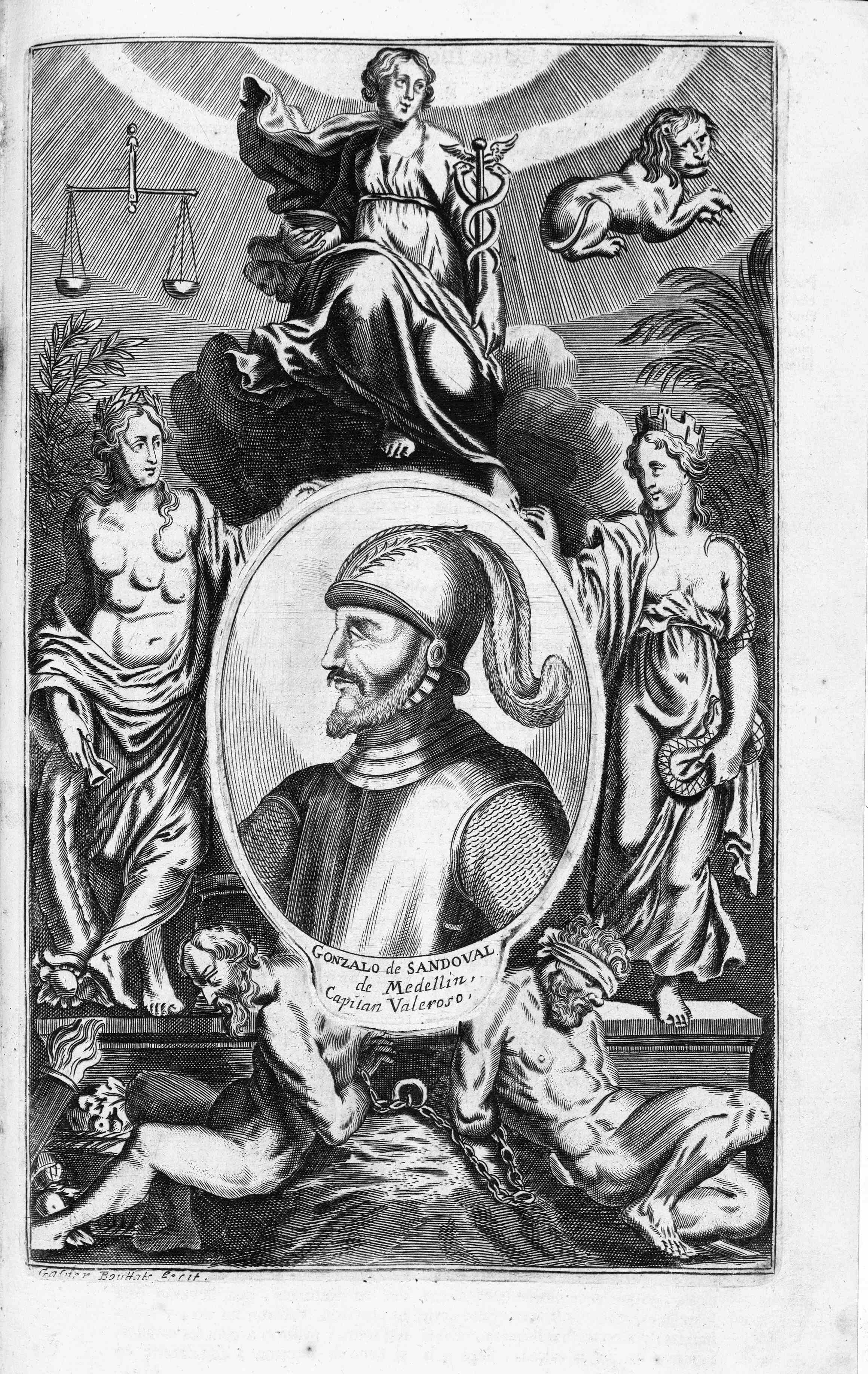 "Historia general de los Hechos de los Castellanos en las Islas y Tierra Firme del Mar Oceano" / escrita por Antonio de Herrera ... Décadas III y IV, en Madrid, en la Oficina Real de Nicolás Rodríguez Franco, 1730. Los grabados firmados lo están por Matías de Irala y Pieter Balthasar Bouttats, que firma en Amberes algunos de los retratos. Biblioteca digital de la Comunidad de Madrid.